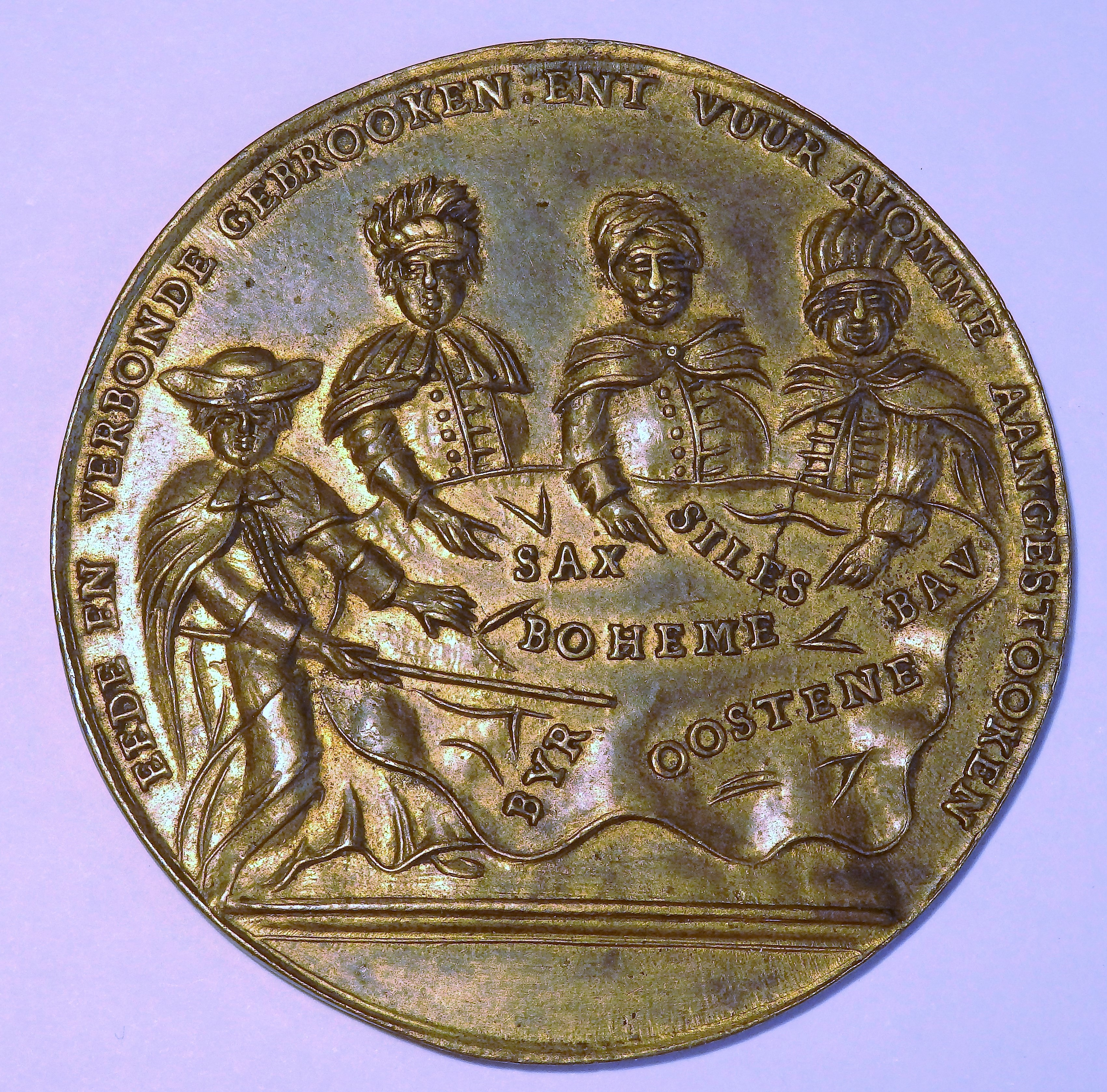 Rückseite der Medaille, vier Fürsten vor Landkarte